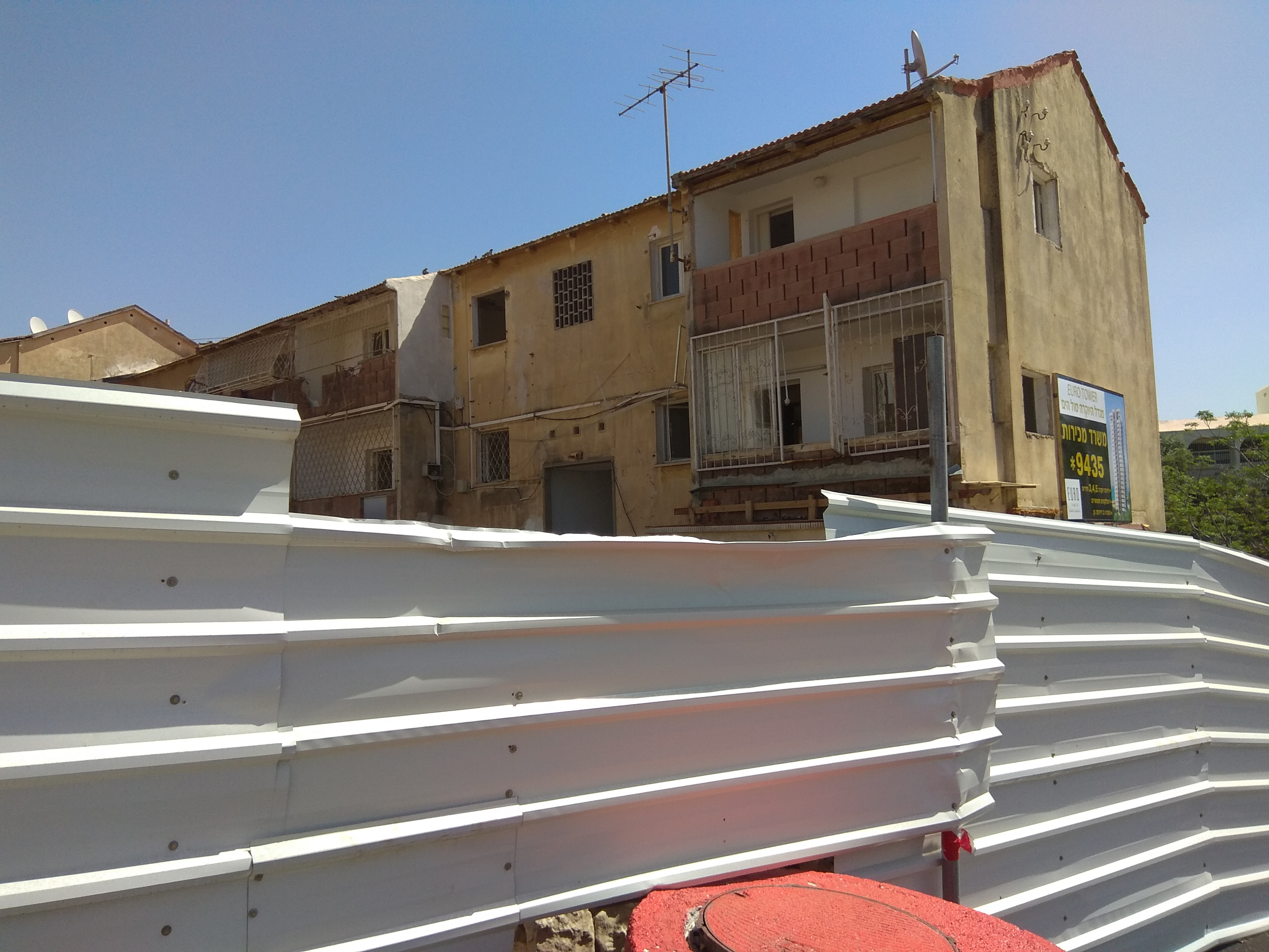 בניין שפונה מדייריו בטרם הריסתו